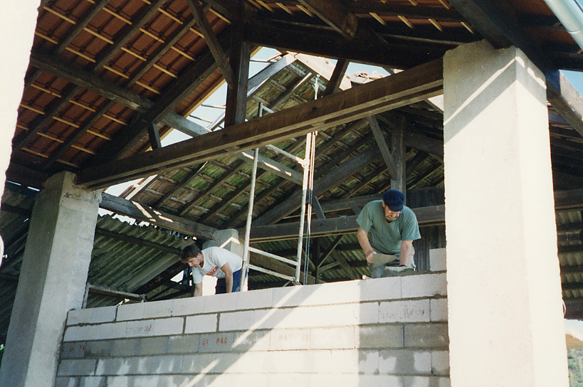 Photo de Olivier LOUIS (utilisateur:leluis)